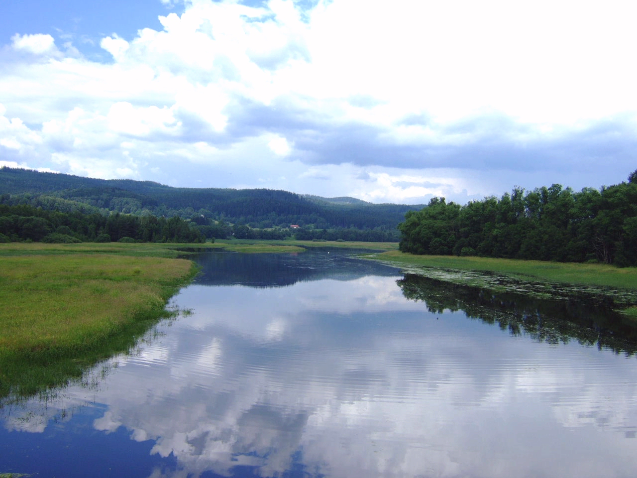 Mündung der Moldau in den Lipno-Stausee bei Novà Pec, Tschechien.